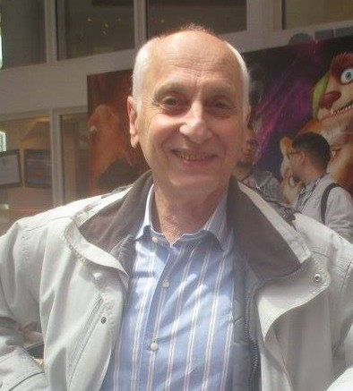 Michel Ocelot au Festival international du film d'animation d'Annecy 2016.